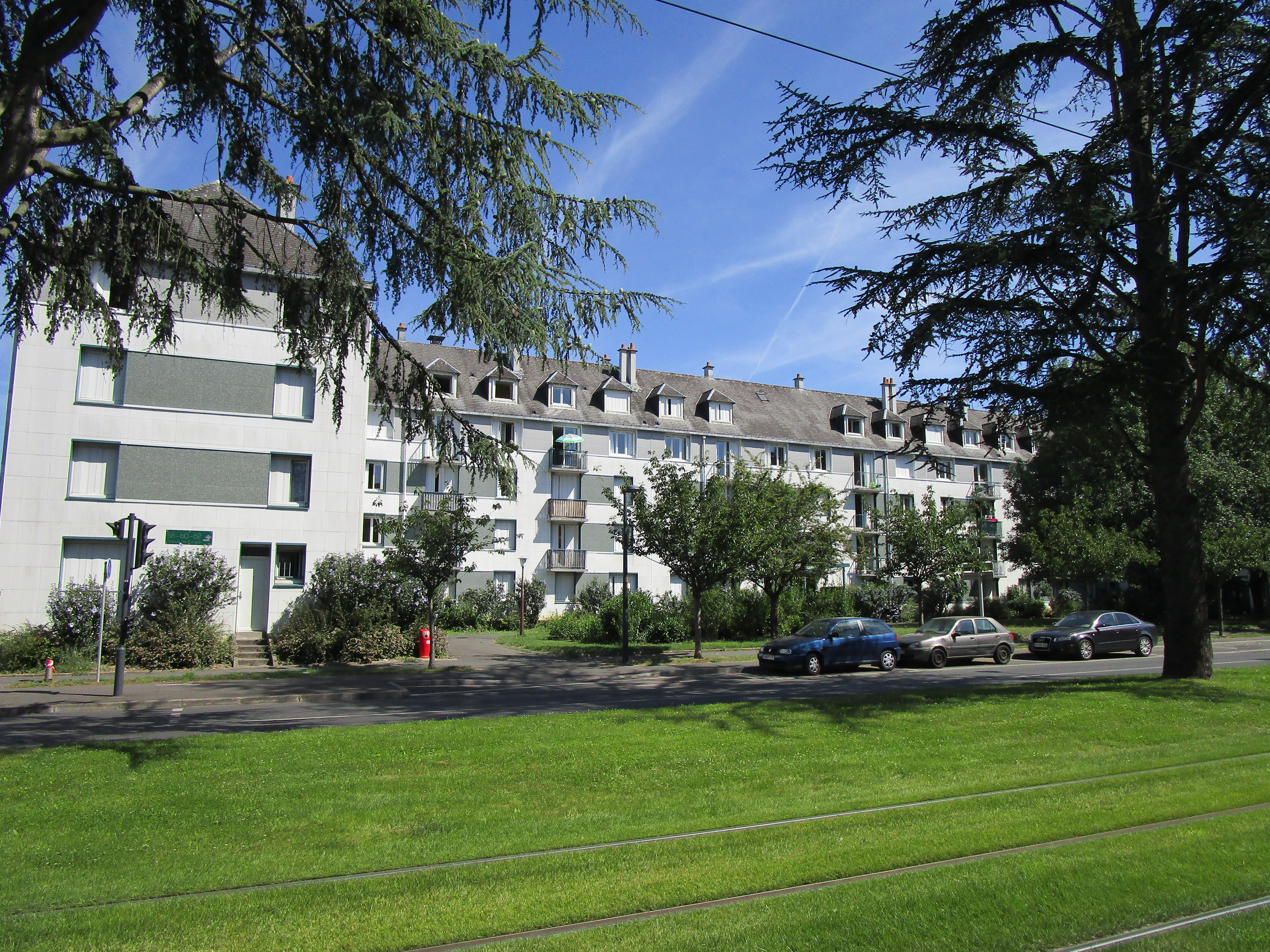 Logements situés au 58 à 62 avenue de l'Europe, dans le quartier Beffroi-Europe à Tours Nord.